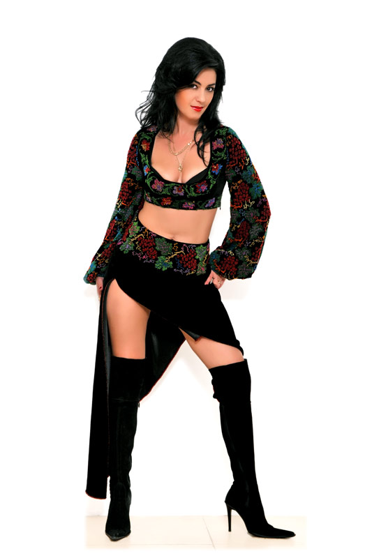 Зоряна Юдін в чорному національному костюмі